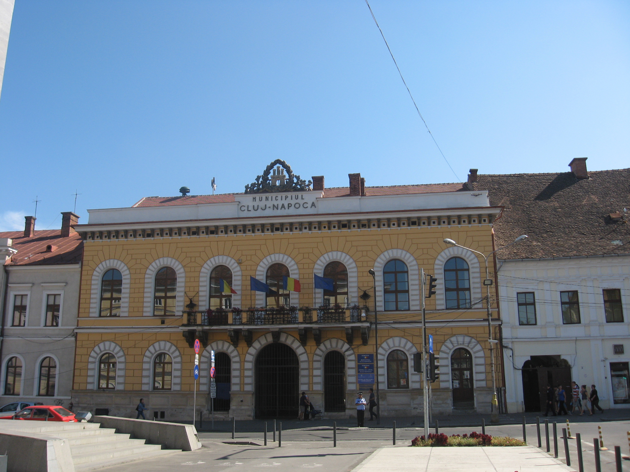 Cluj-Napoca, Consiliul Local (Piaţa Unirii nr.1-2)